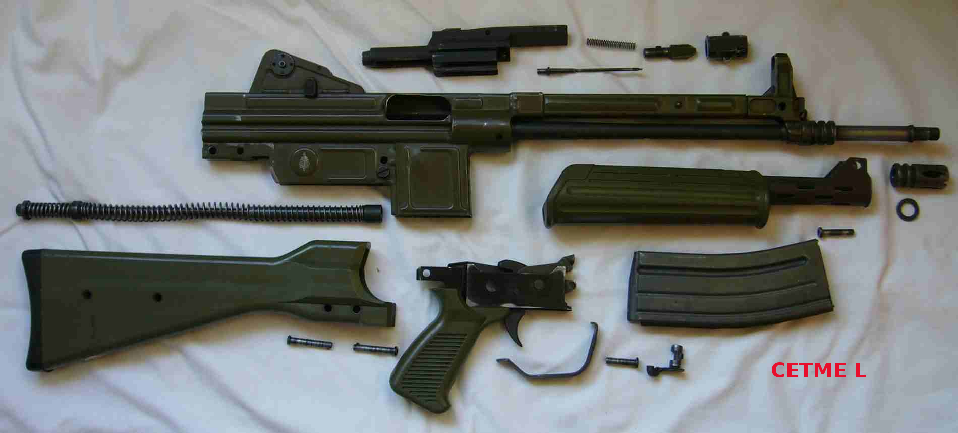 Despiece básico del fusil de asalto CETME modelo L de calibre 5,56 x 45 (.223)